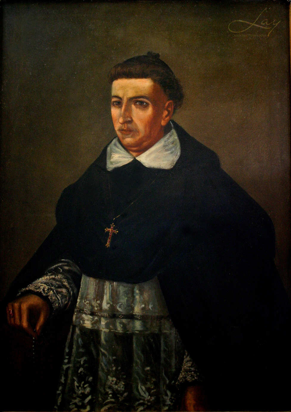 Felipe Galindo Chávez